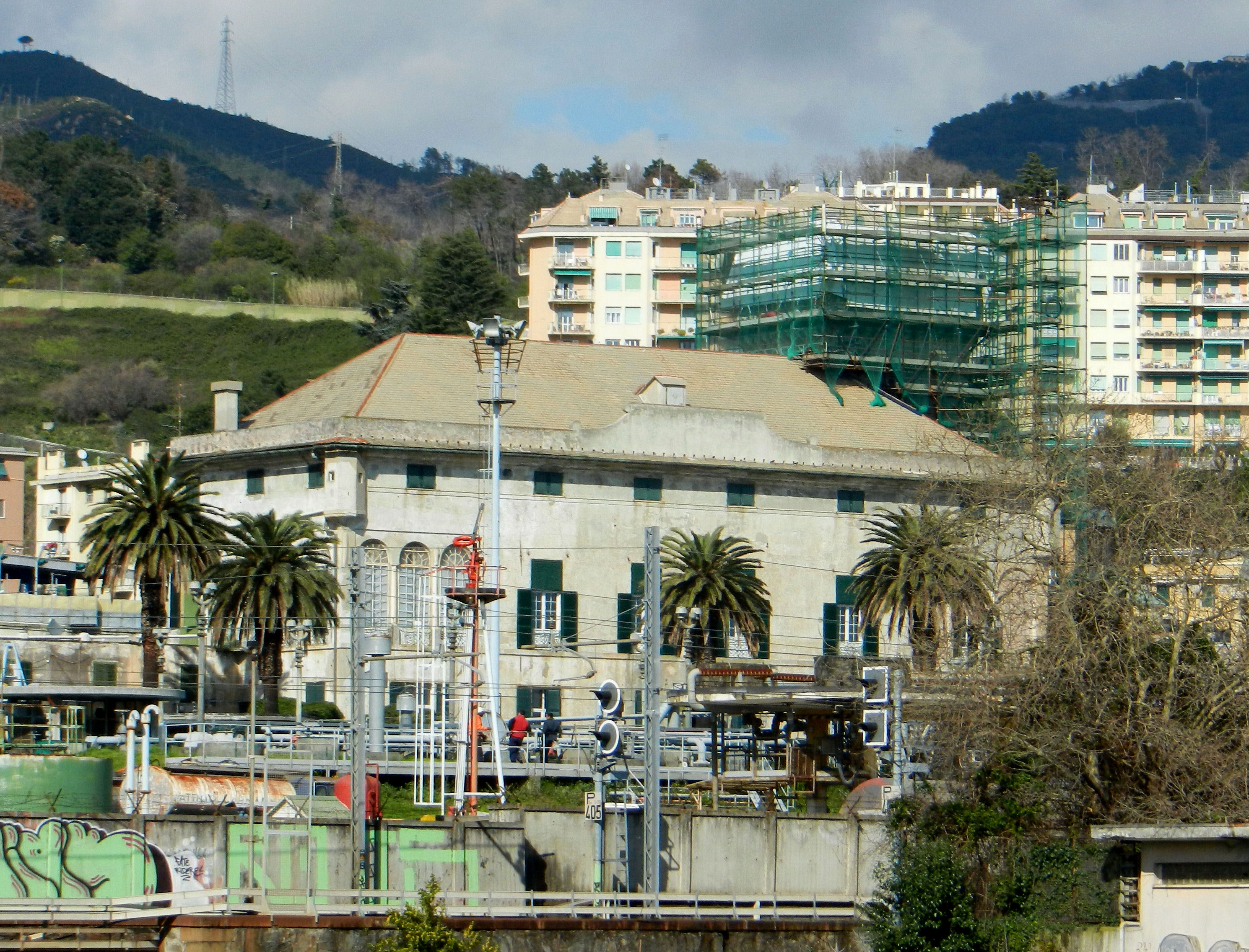 Genova, quartiere di Pegli (Multedo), Villa Lomellini Rostan